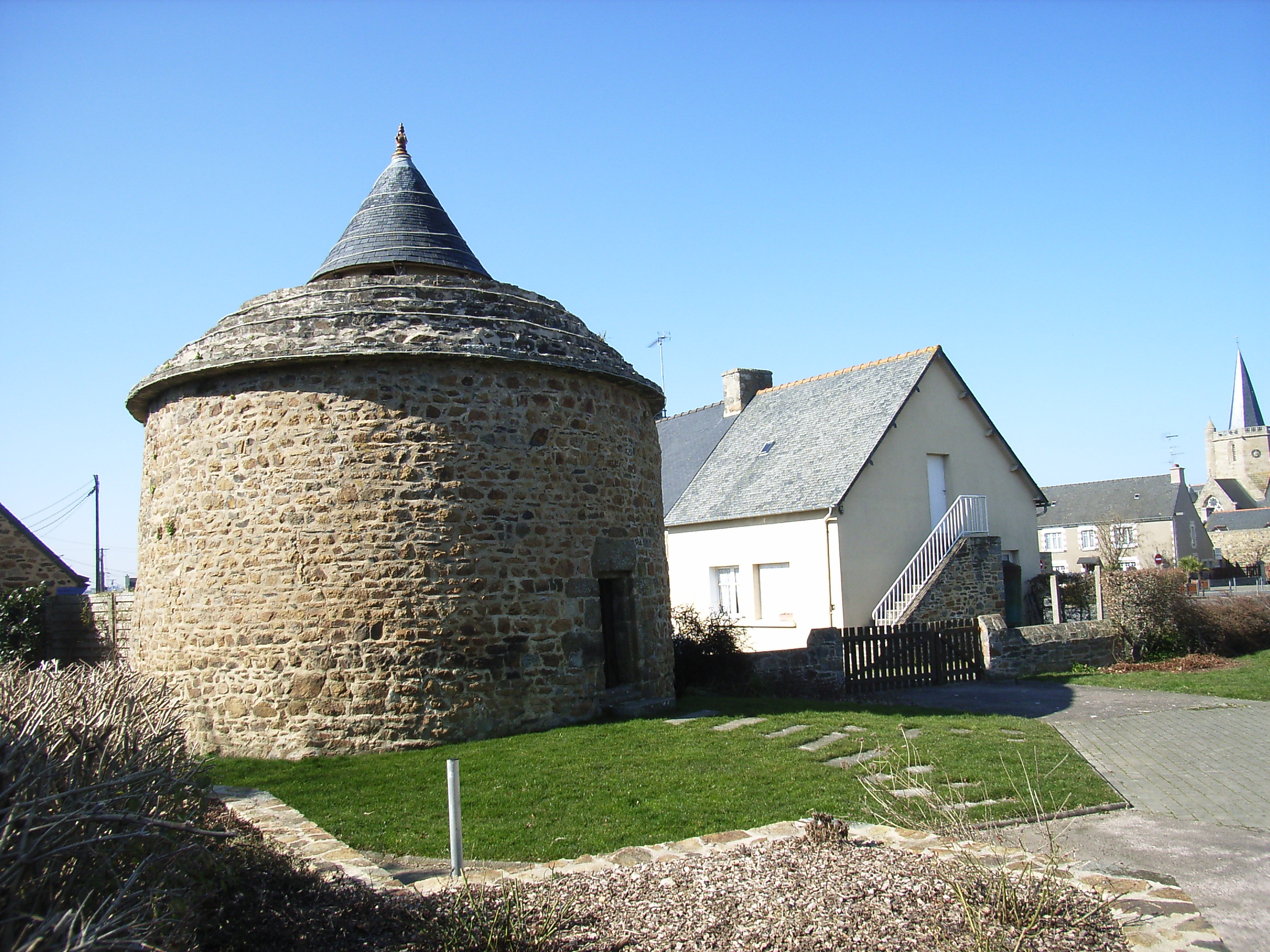 Kolombejo en Hillion, nura vestiĝo de la kastelo Clos-Gueguen